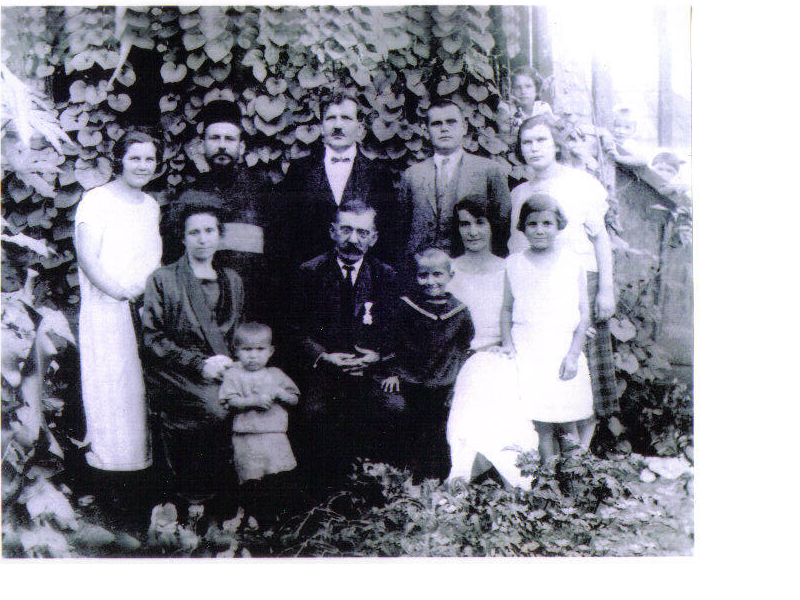 Српски (ћирилица): Учитељ Љубомир Попадић са својом породицом